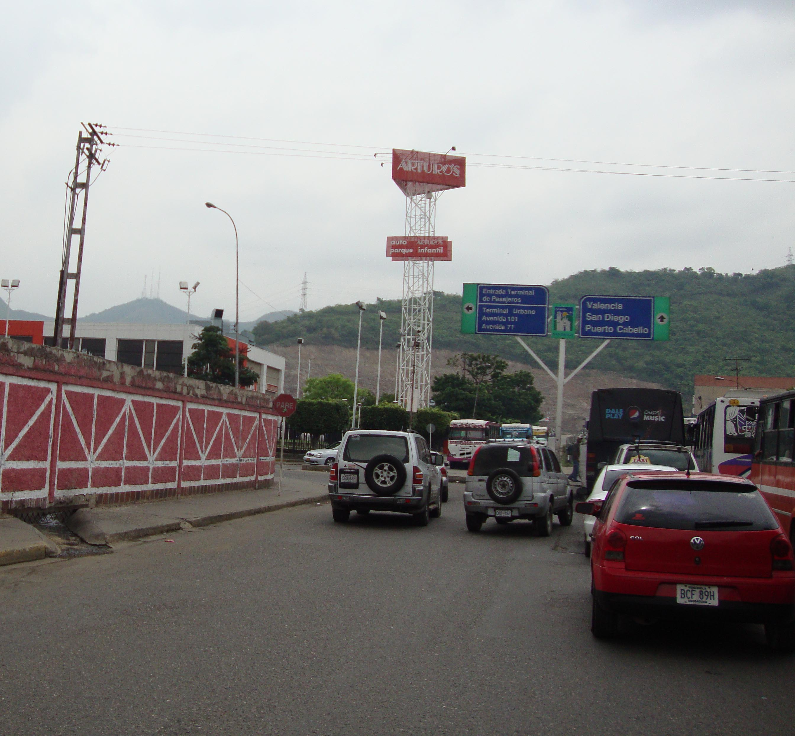 Parque Comercial Industrial Castillito, San Diego 2006, Carabobo, Venezuela